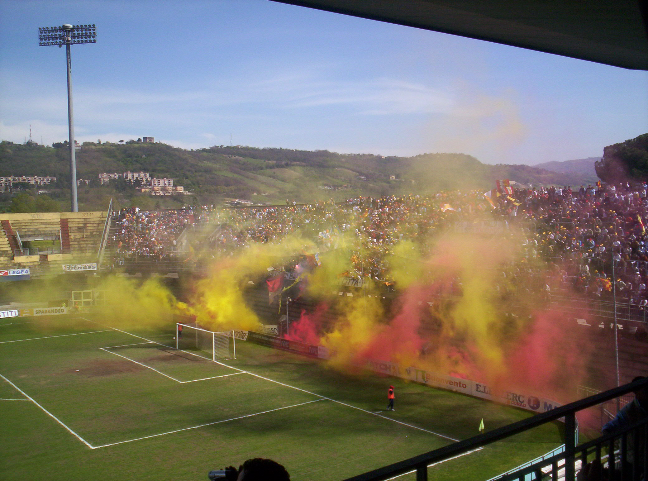 Stadio Santa Colomba in Benevento, Italy